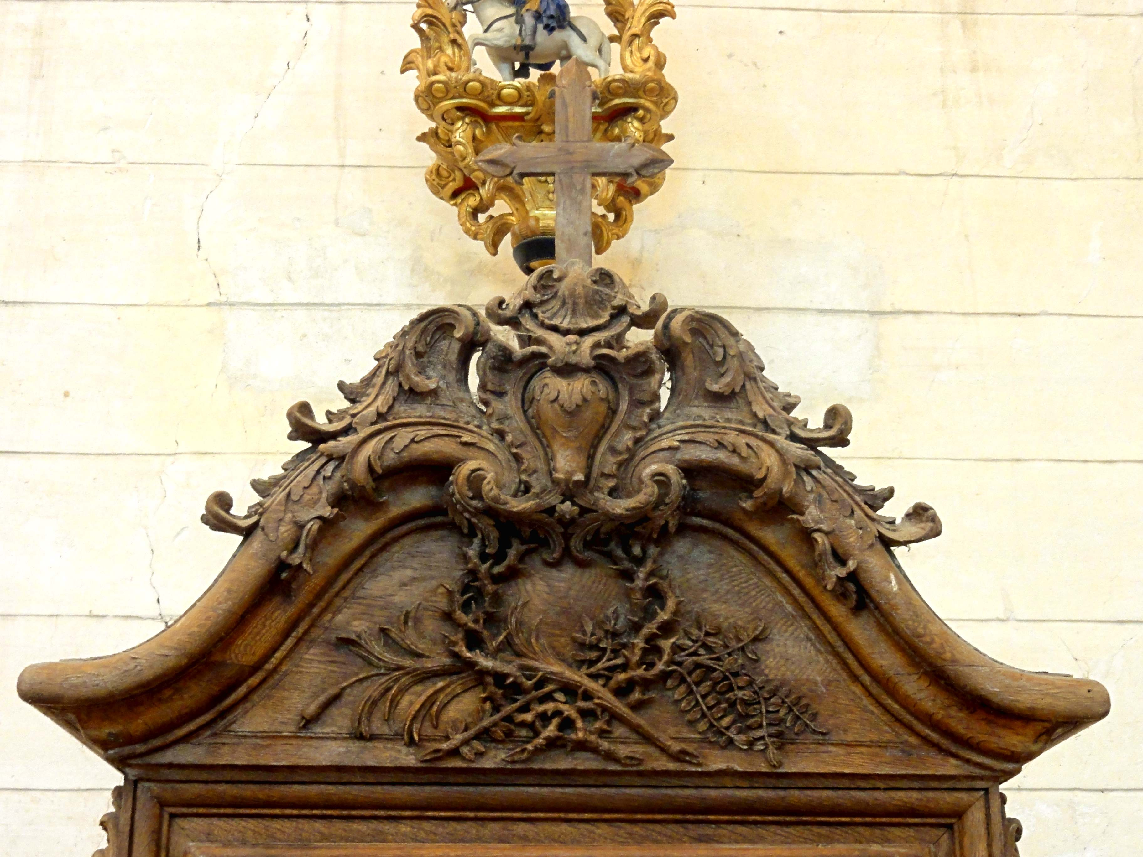 Confessional, fronton de la loge centrale.